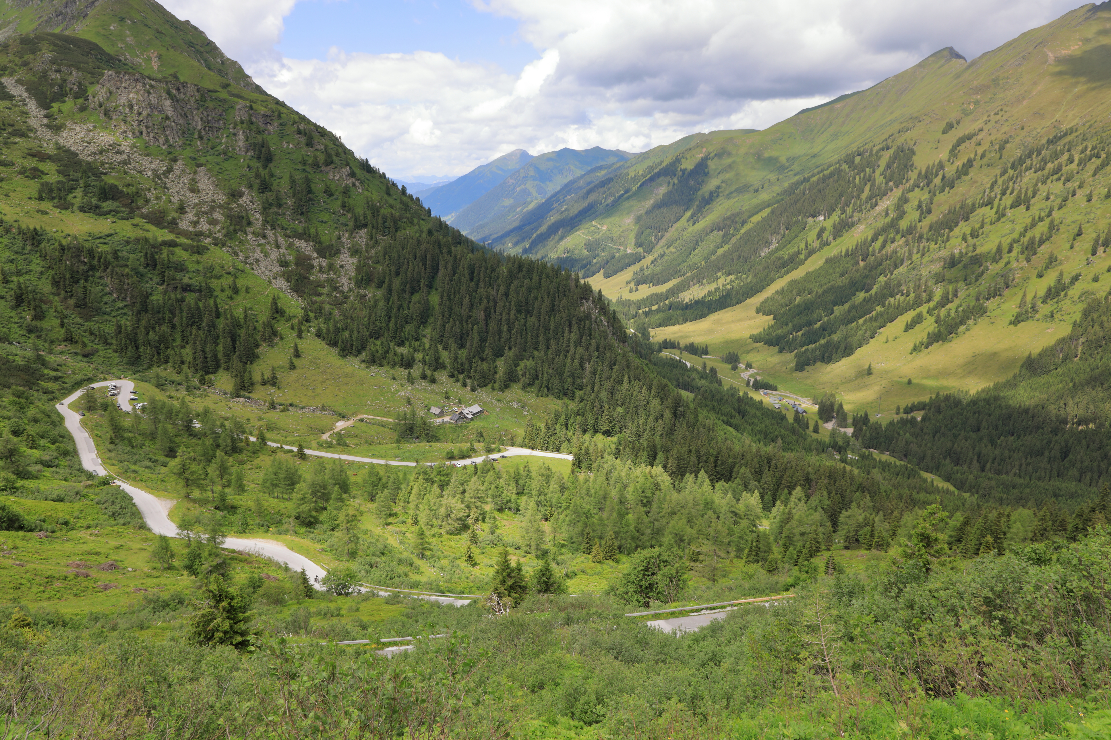 Blick von der Hochkehre der Sölkpassstraße bzw. Erzherzog-Johann-Straße Richtung Norden ins Sölktal. This file shows the Nature Park with the ID 6399 in Austria.